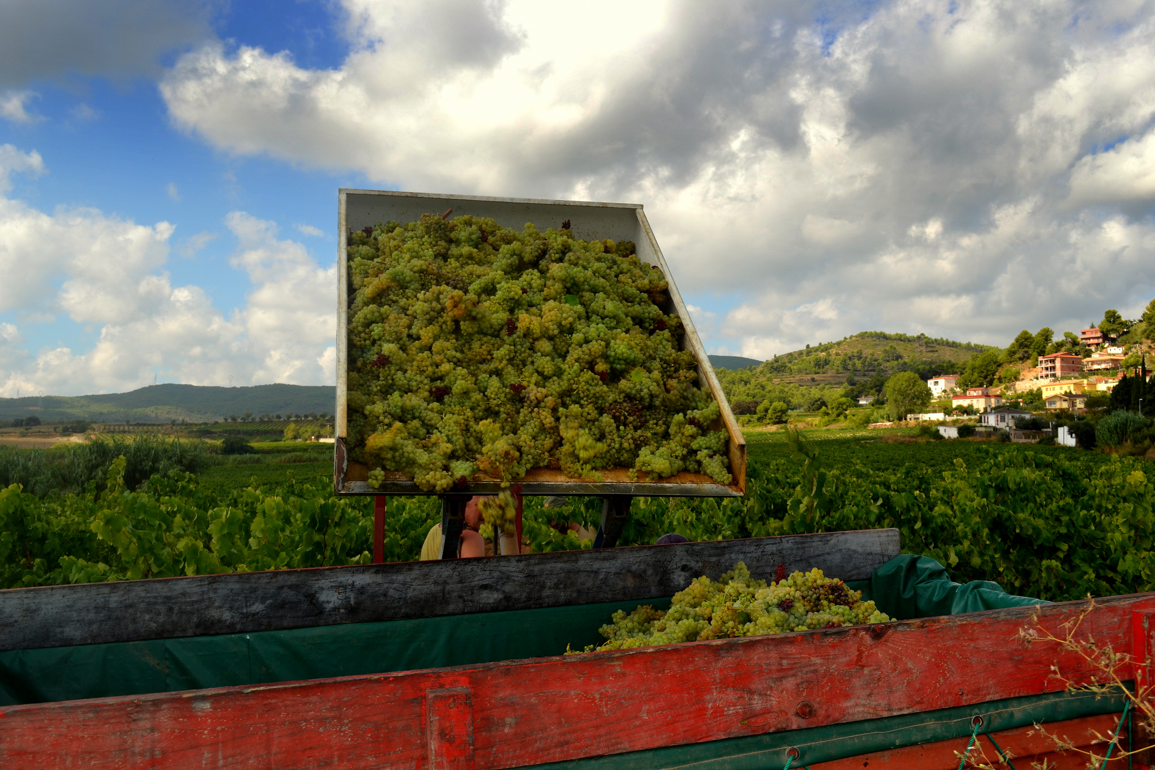 Verema 2013, Macabeu, Torrelles de Foix, el Penèdes